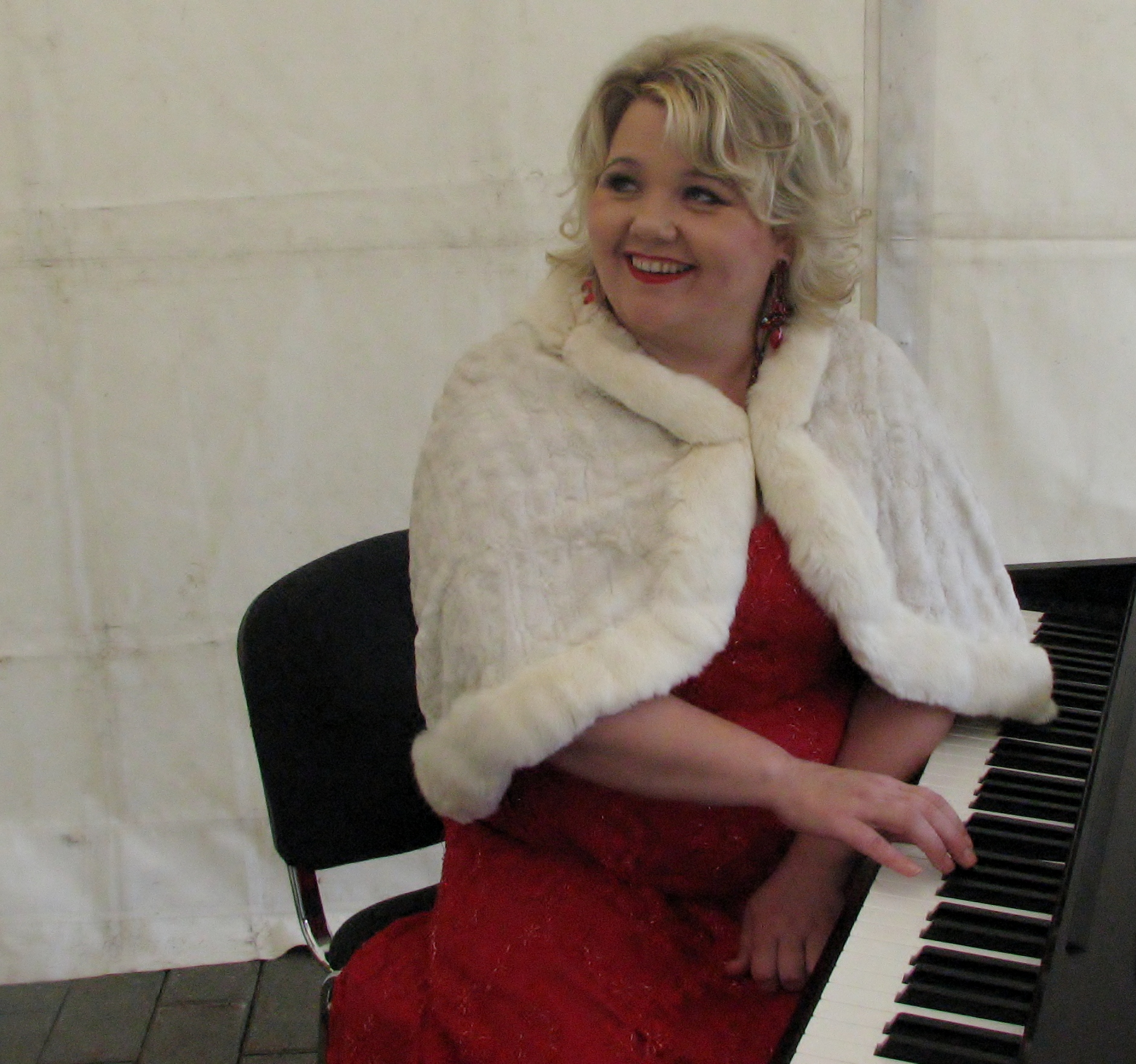 Heli Veskus Estonia teatri 107. hooaja avamisel laulutundi andmas